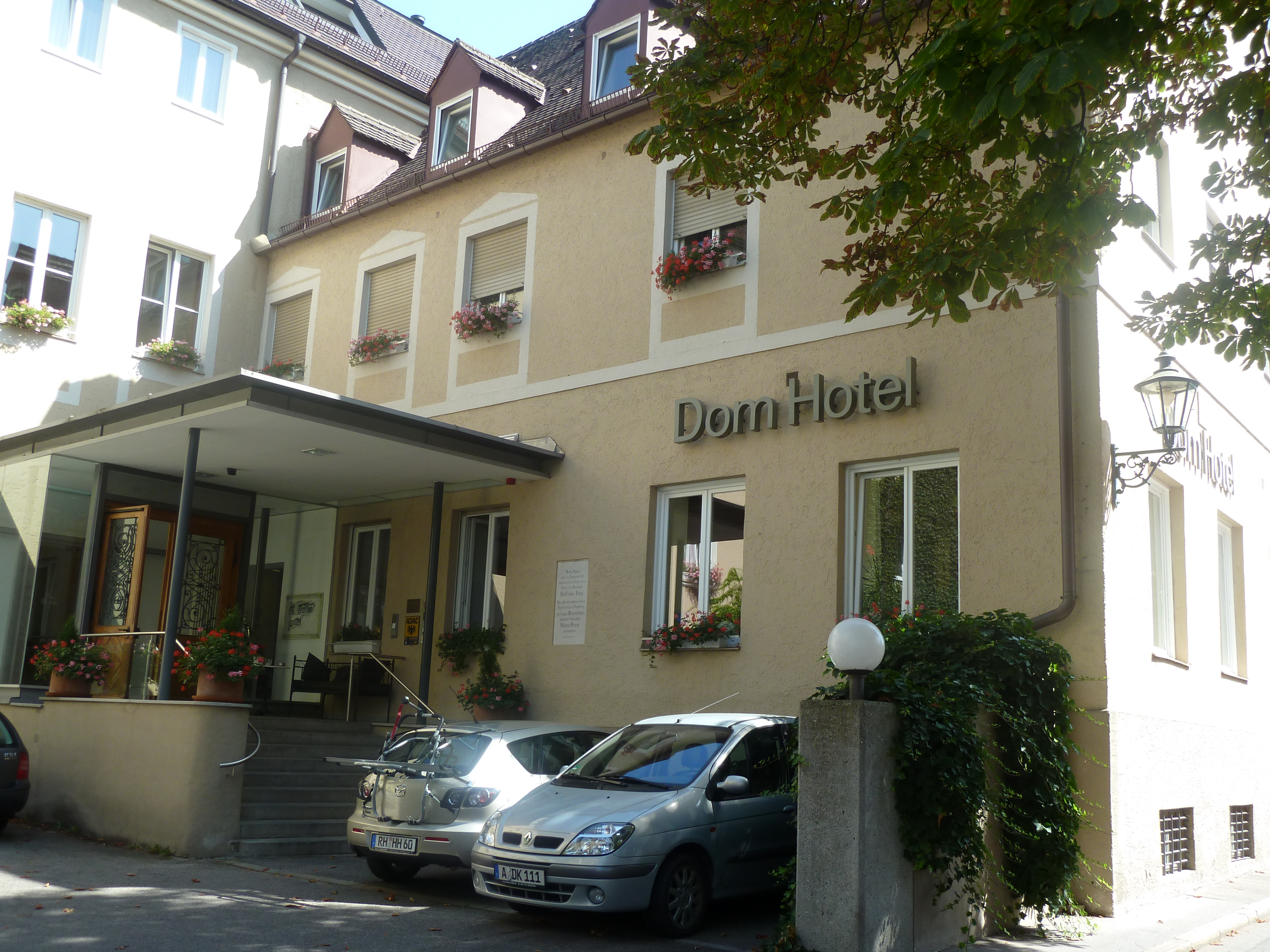 Dompropstei in der Bischofsstadt, Frauentorstraße 8